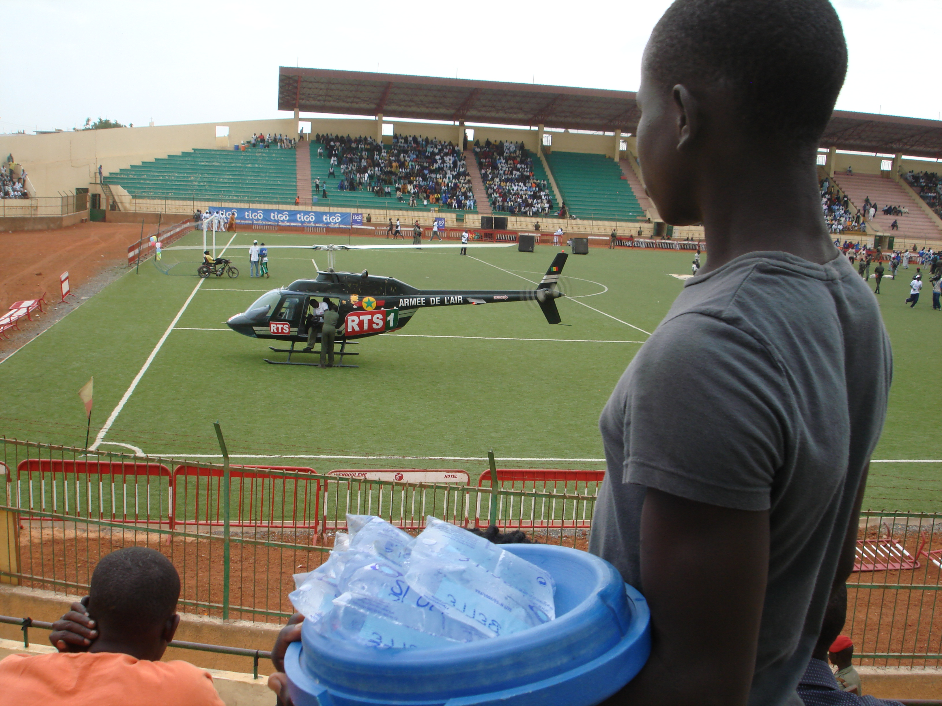 La Radio-télévision sénégalaise (RTS) avec un hélicoptère militaire sur le stade Demba Diop de Dakar à l'occasion d'un combat de lutte sénégalaise